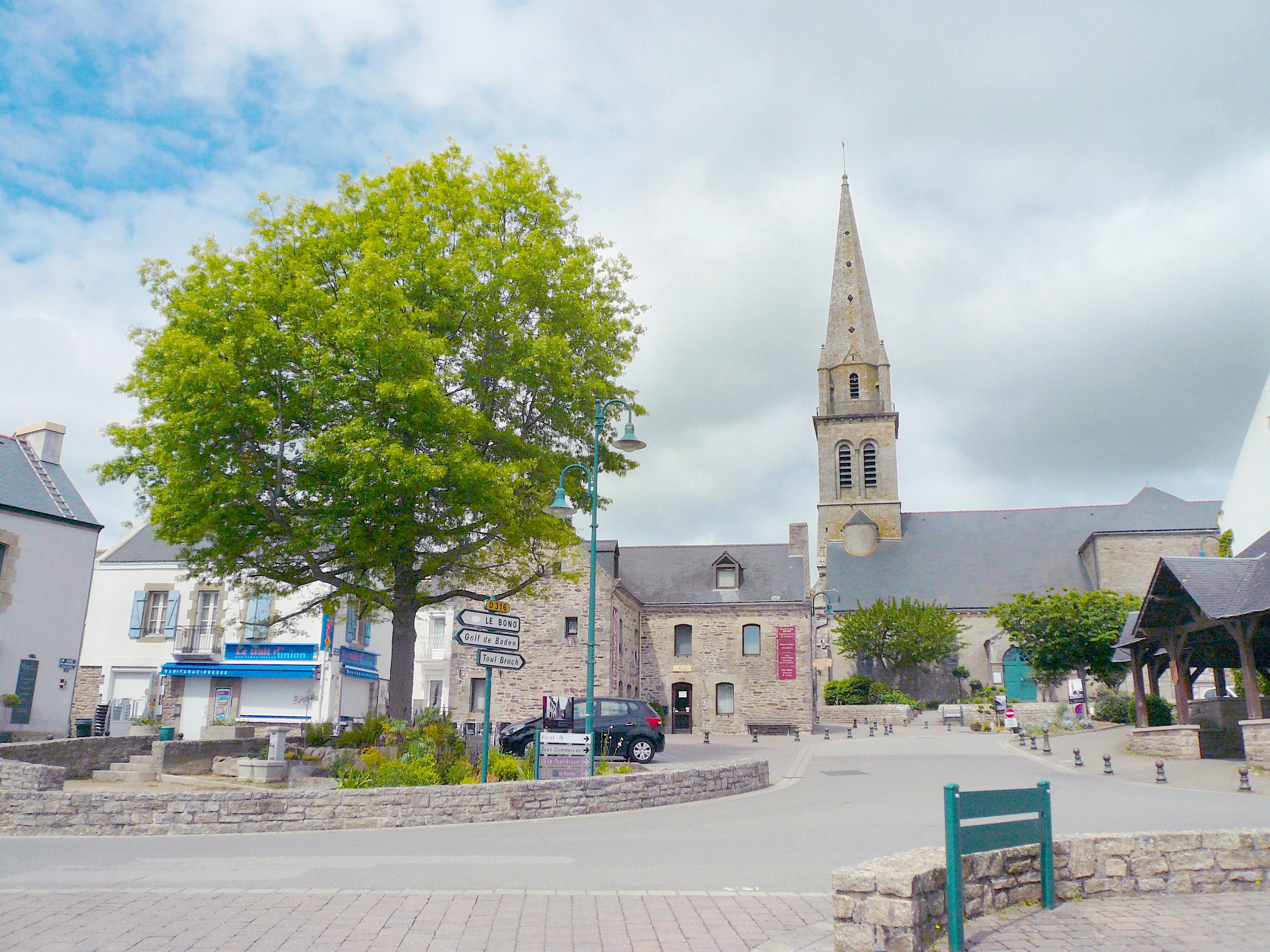 La place de Weilheim et l'église Saint-Pierre à Baden près du golfe du Morbihan.